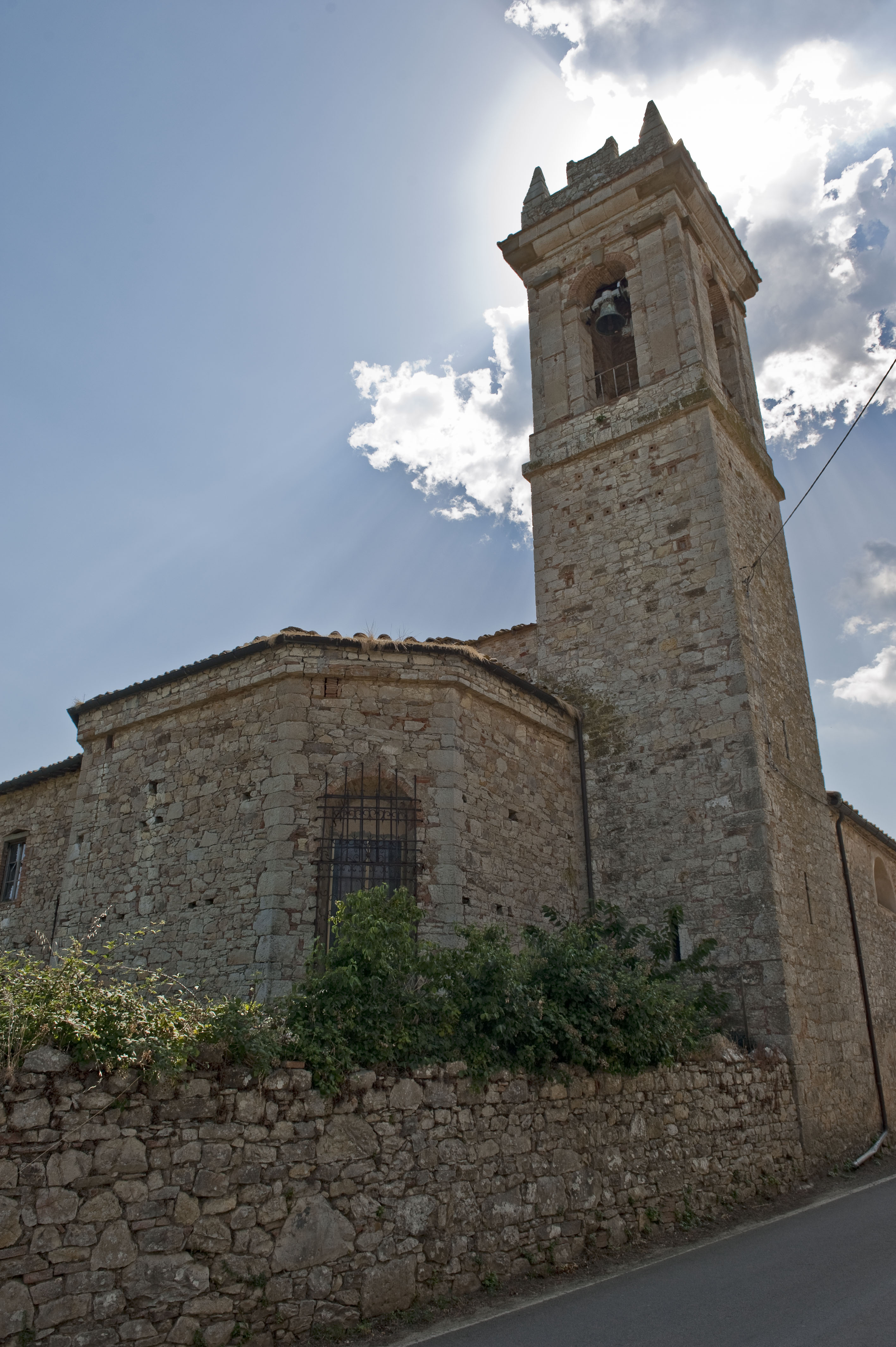 Tribuna della pieve di San Marcellino (Gaiole in Chianti)